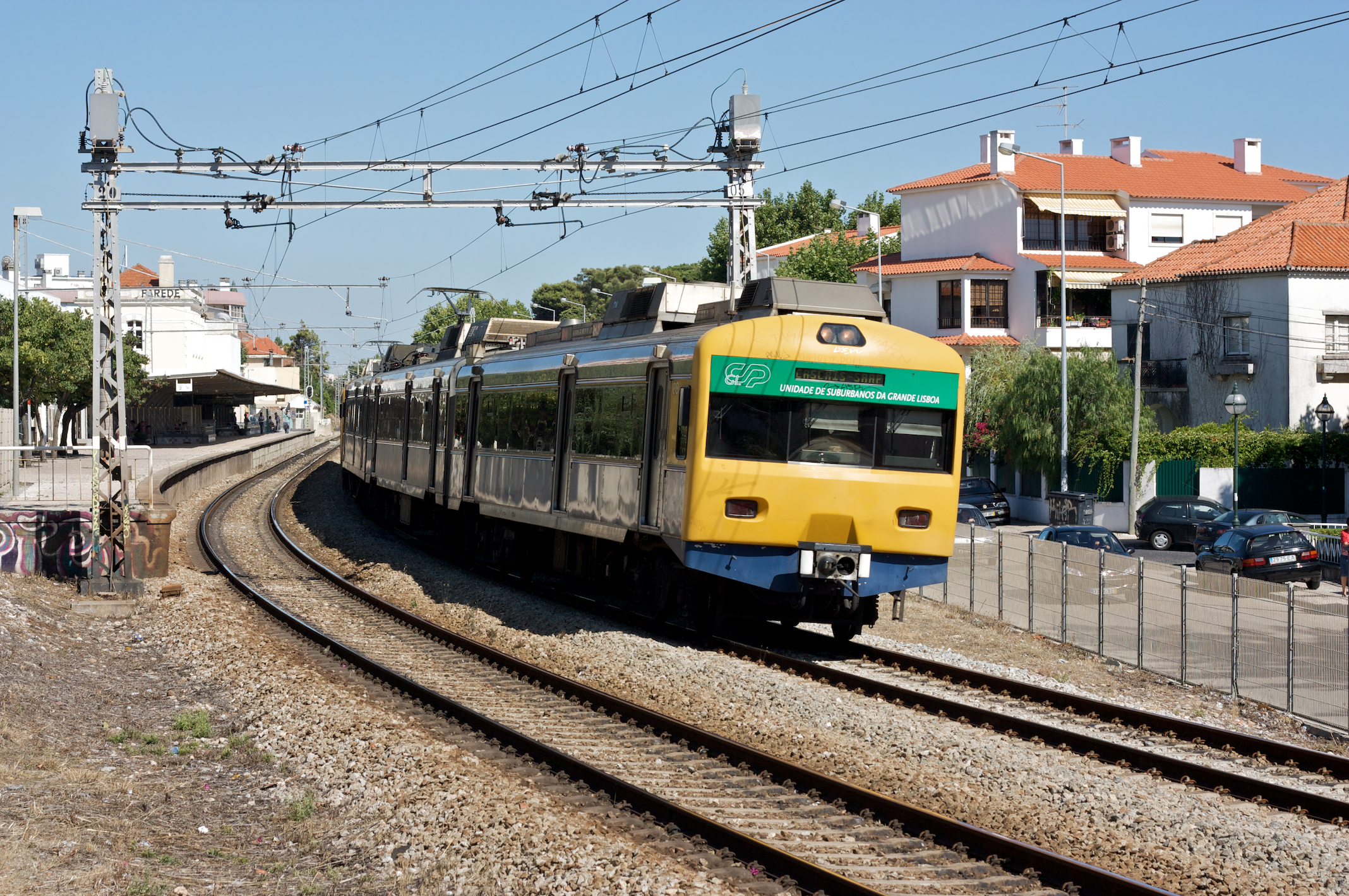 Tipo: Comboio Urbano 19299 [Cais do Sodré - Cascais] Local: Apeadeiro da Parede [Linha de Cascais, PK 19] Data e hora: 2 de Julho de 2009 [17h05] Material: Automotoras 3160 e 3266 [Unidade Tripla Eléctrica + Unidade Quádrupla Eléctrica]